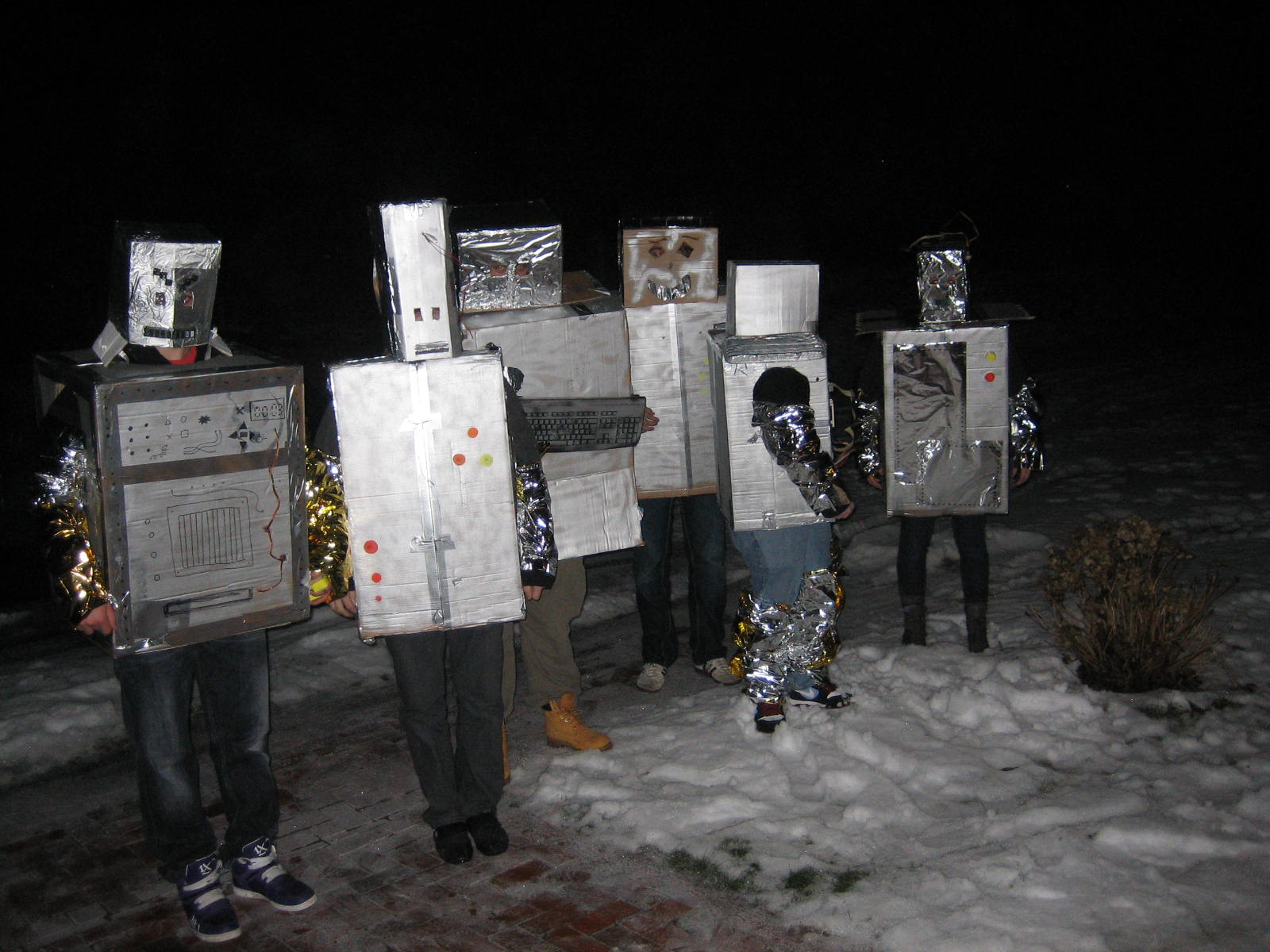 Nordfriisk: Hulken faan Oomram